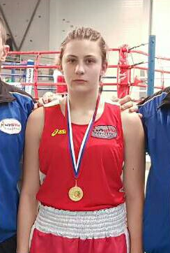 Анђела Костић шампионка Србије.